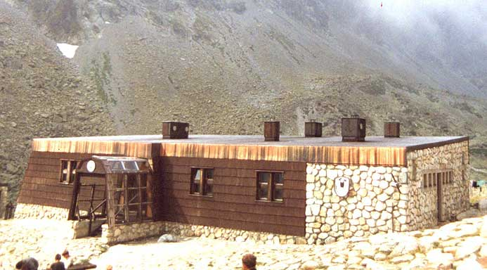 Zbojnícka Chata